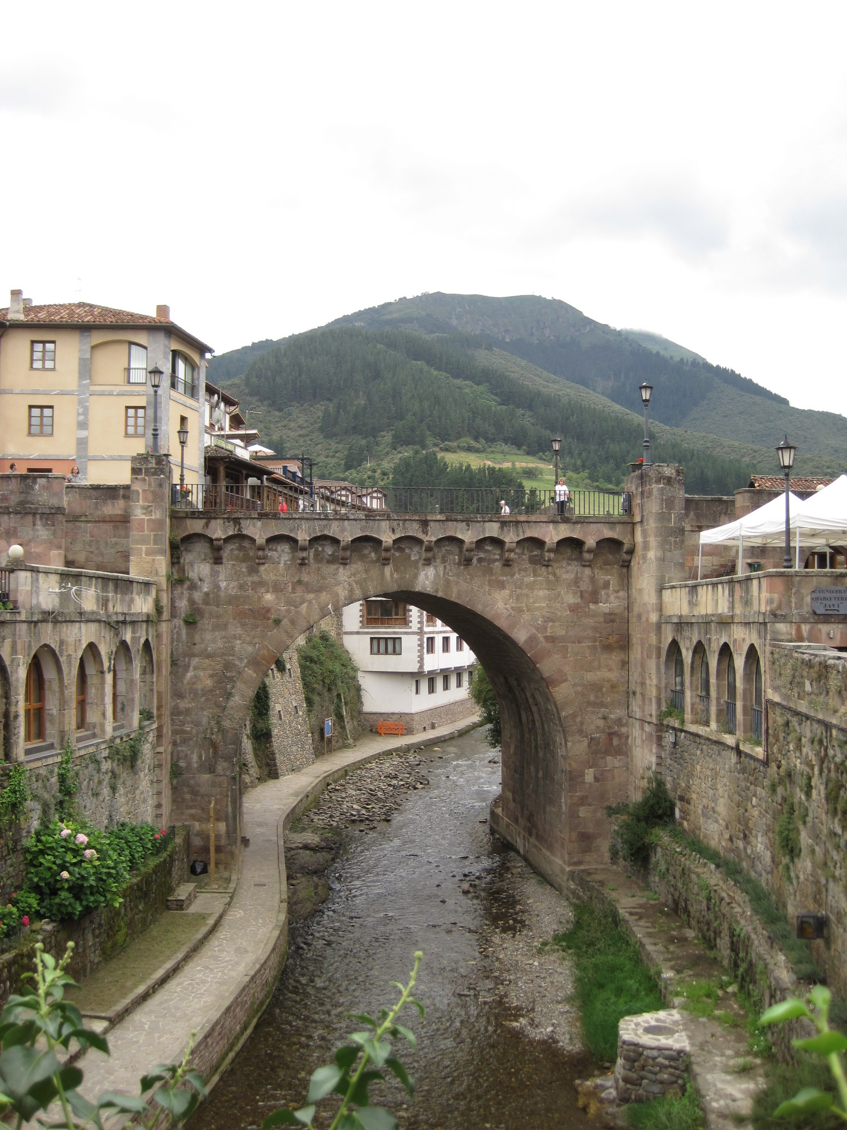 El río Quiviesa a su paso por Potes (Cantabria, España).